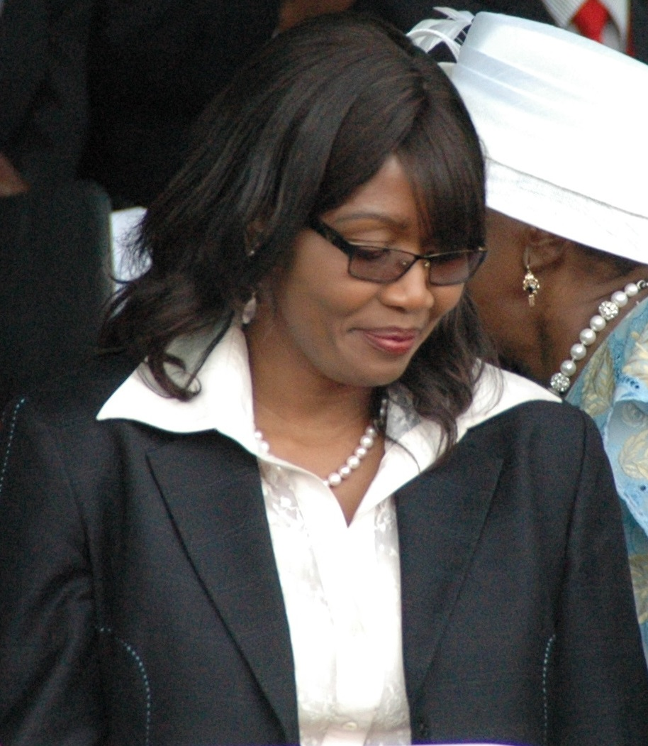 Saara Kuugongelwa-Amadhila, bei der Vereidigung zur Premierministerin